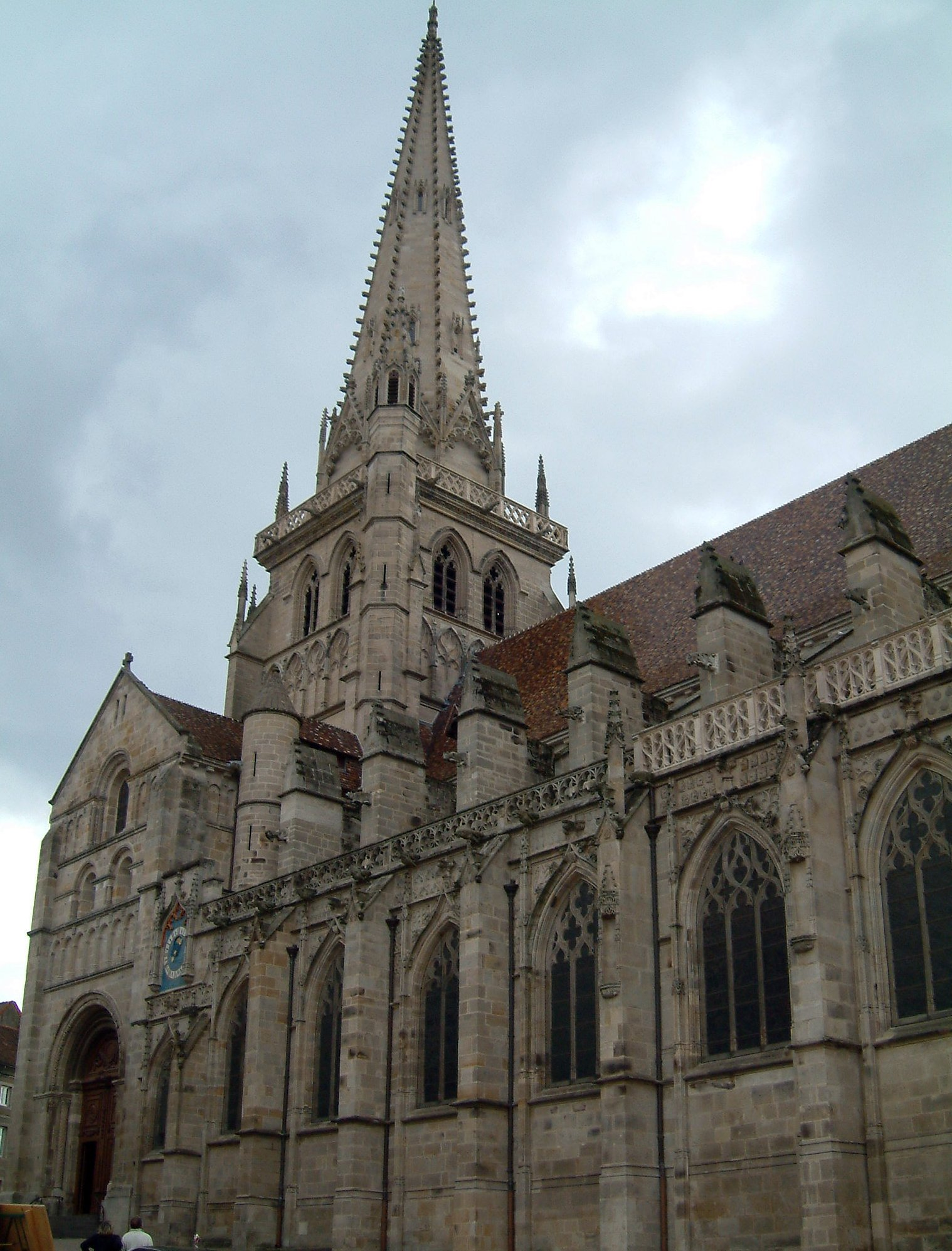 Cathédrale, Autun, Bourgogne, FRANCE